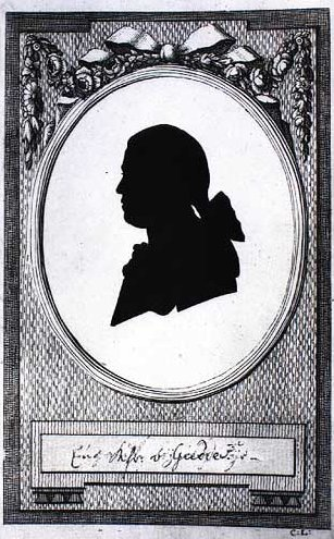 Verner Hans Rudolph Rosenkrantz Gjedde (4.10.1756-1.11.1816) dansk kammerherre og kapelchef